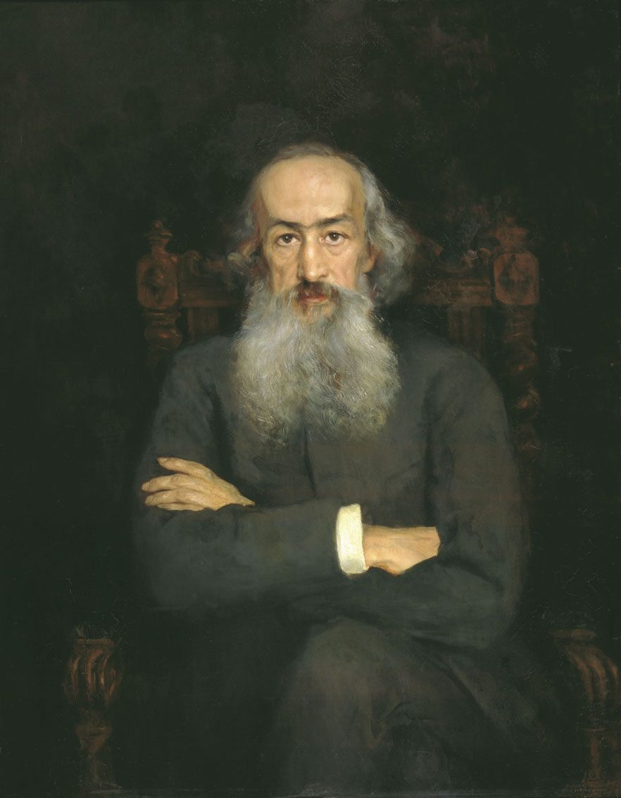 Портрет К.Н. Бестужева-Рюмина